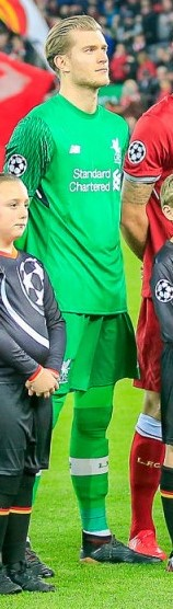 Liverpool FC